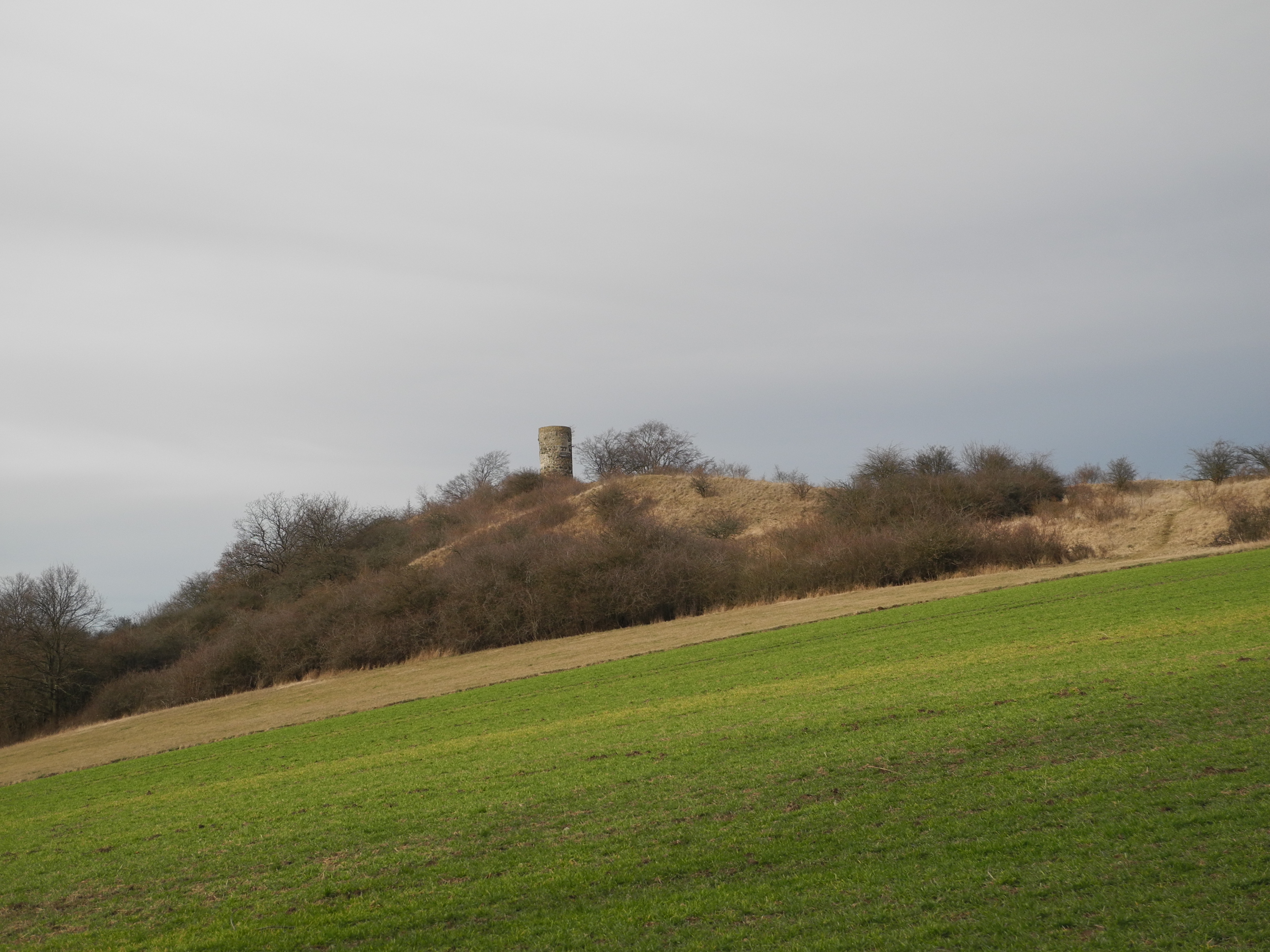 Flächenhaftes Naturdenkmal im Landkreis Kassel 6.33.916. „Basaltkuppe Die Warte“ nordwestlich von Zierenberg.